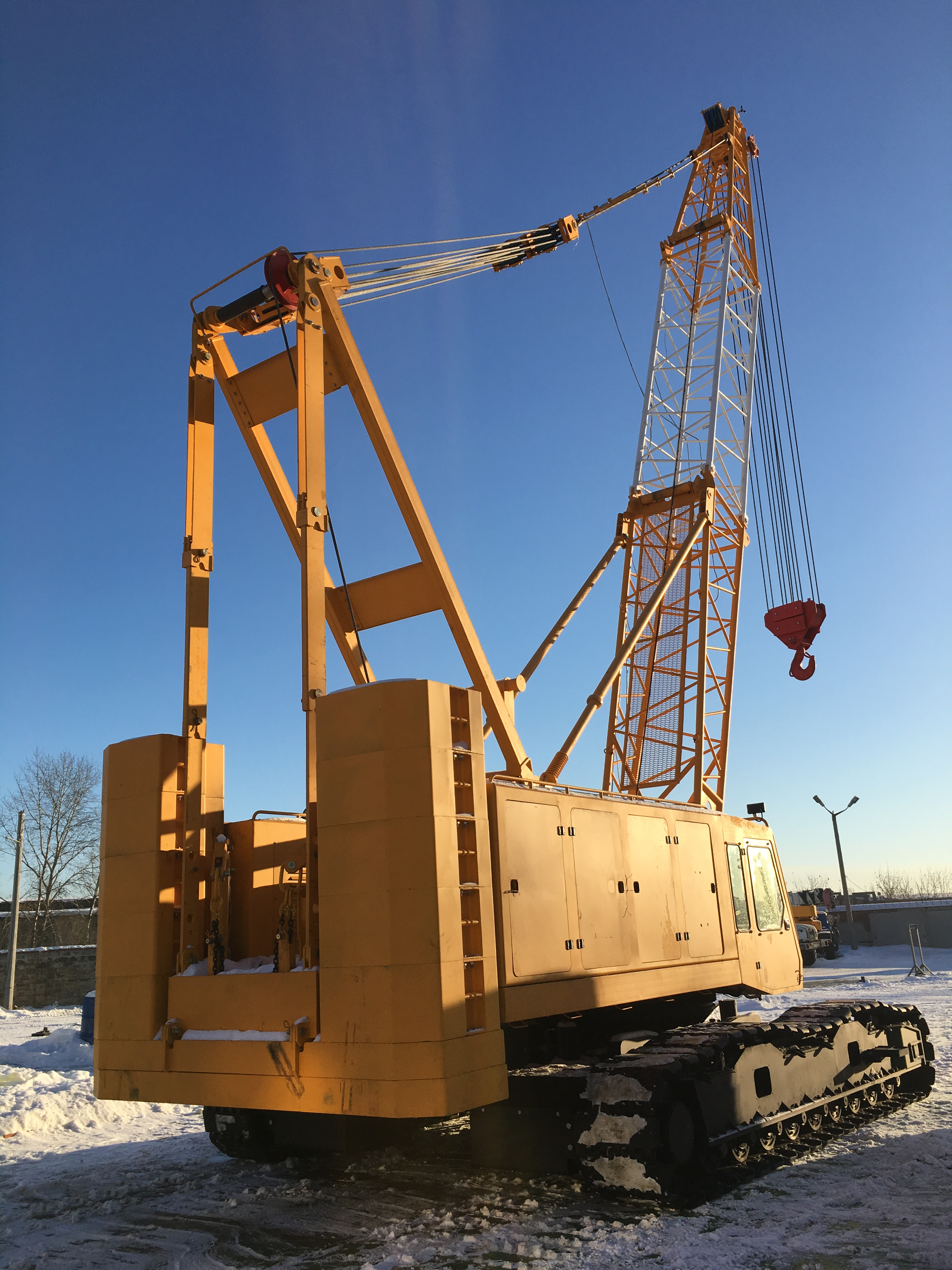 ДЭК - 501 на площадке завода